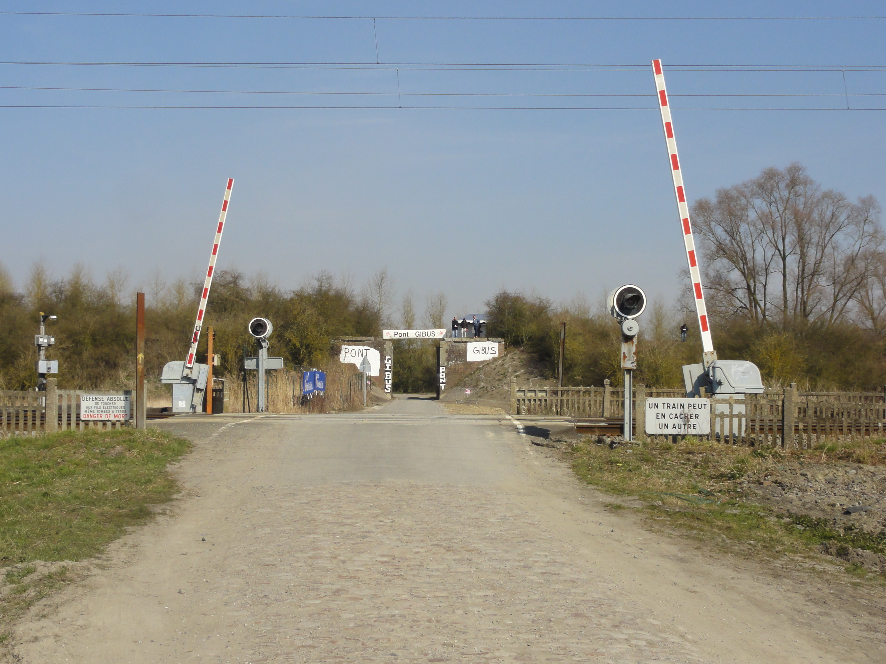 Reportage photographique réalisé le dimanche 7 avril 2013 durant l'édition 2013 du Paris-Roubaix à Wallers, Nord, Nord-Pas-de-Calais, France. Les fichiers ont été réalisés près du pont Gibus de l'ancienne ligne de Denain à Saint-Amand-les-Eaux, dans les cités de la fosse Arenberg, et à la trouée d'Arenberg.